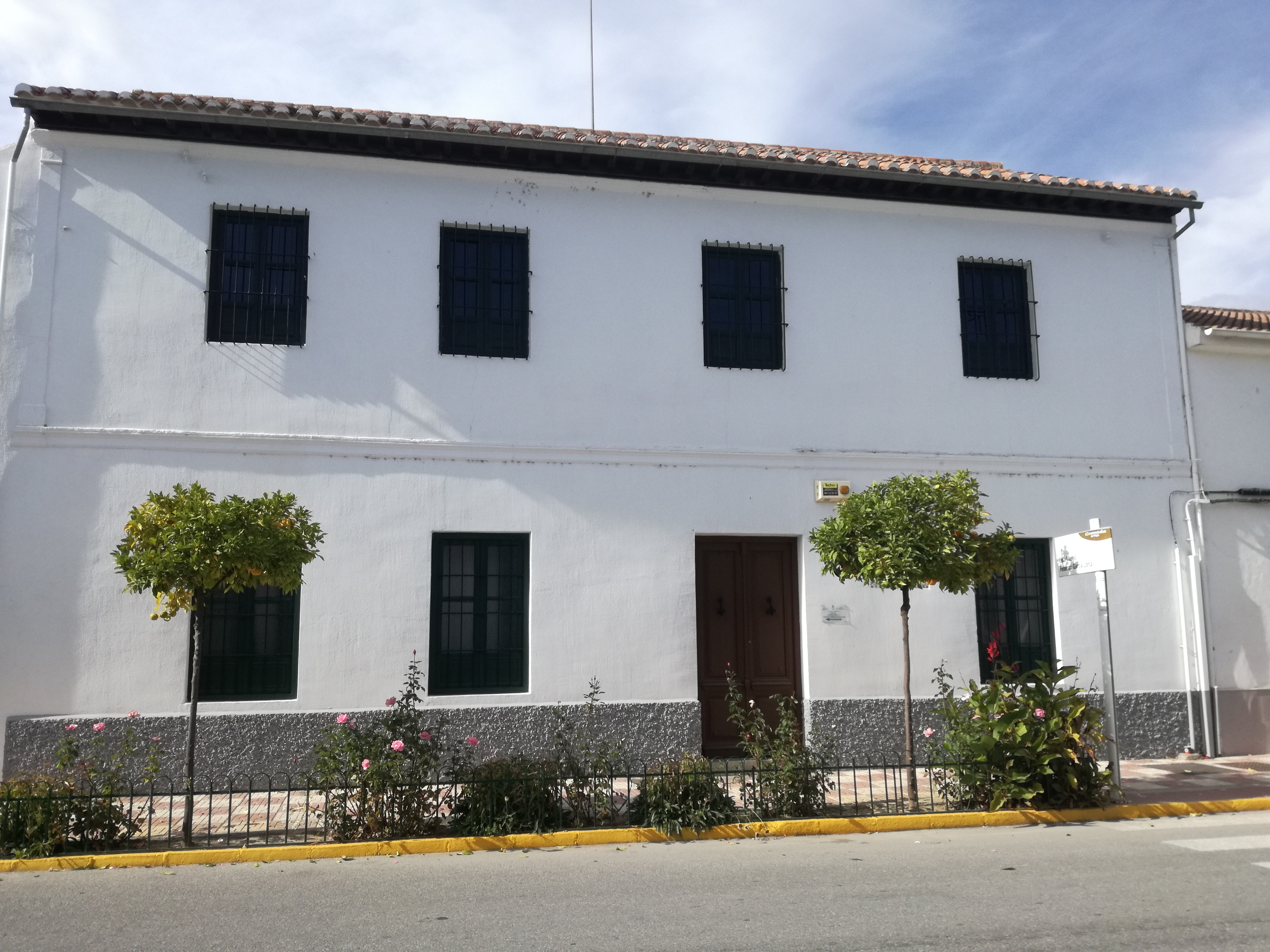 Casa en la que vivió Federico García Lorca dsde 1905 hasta 1909. Después hasta 1926 pasaría en ella los veranos junto a su familia.